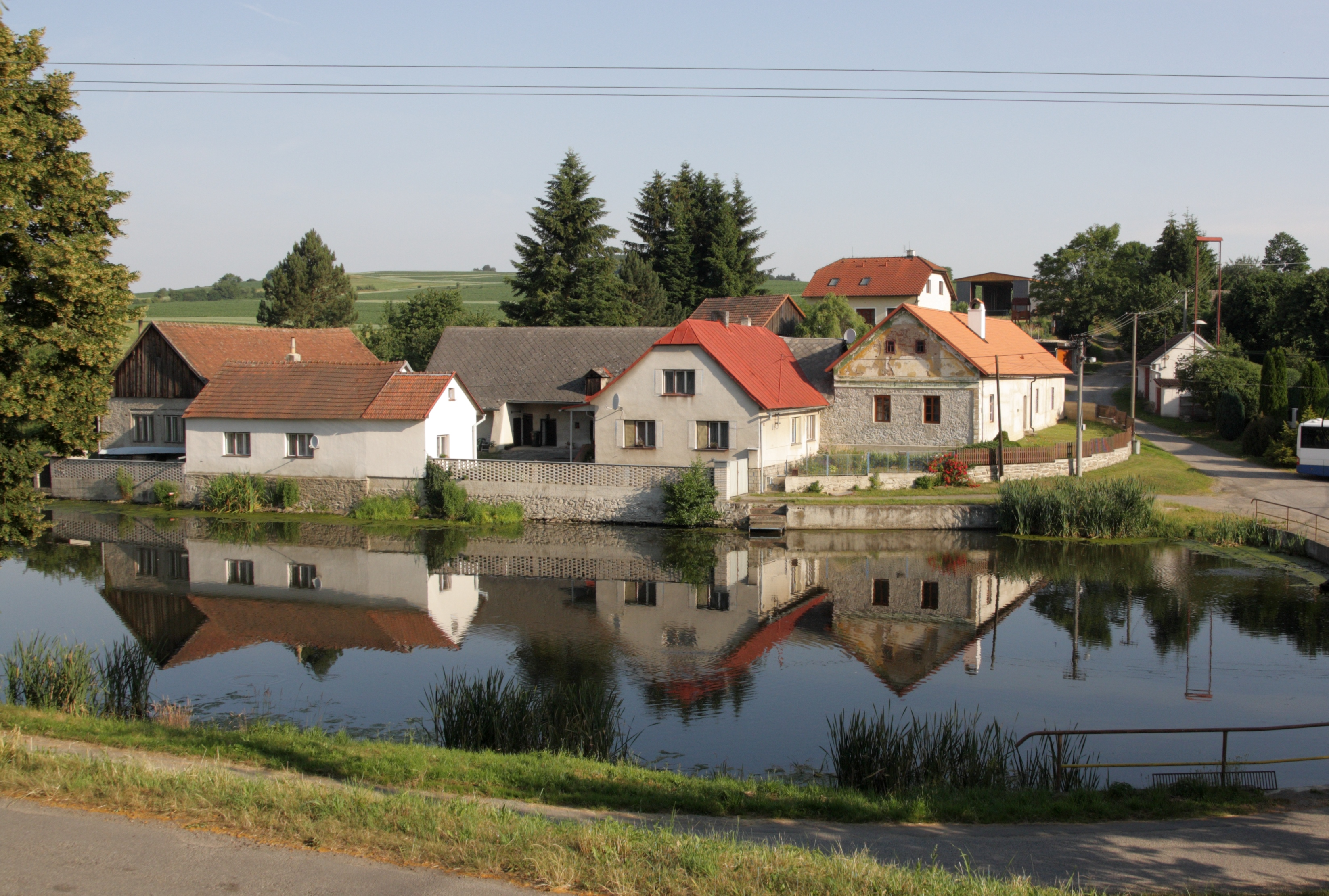 Přímělkov - náves s Přímělkovským rybníkem.